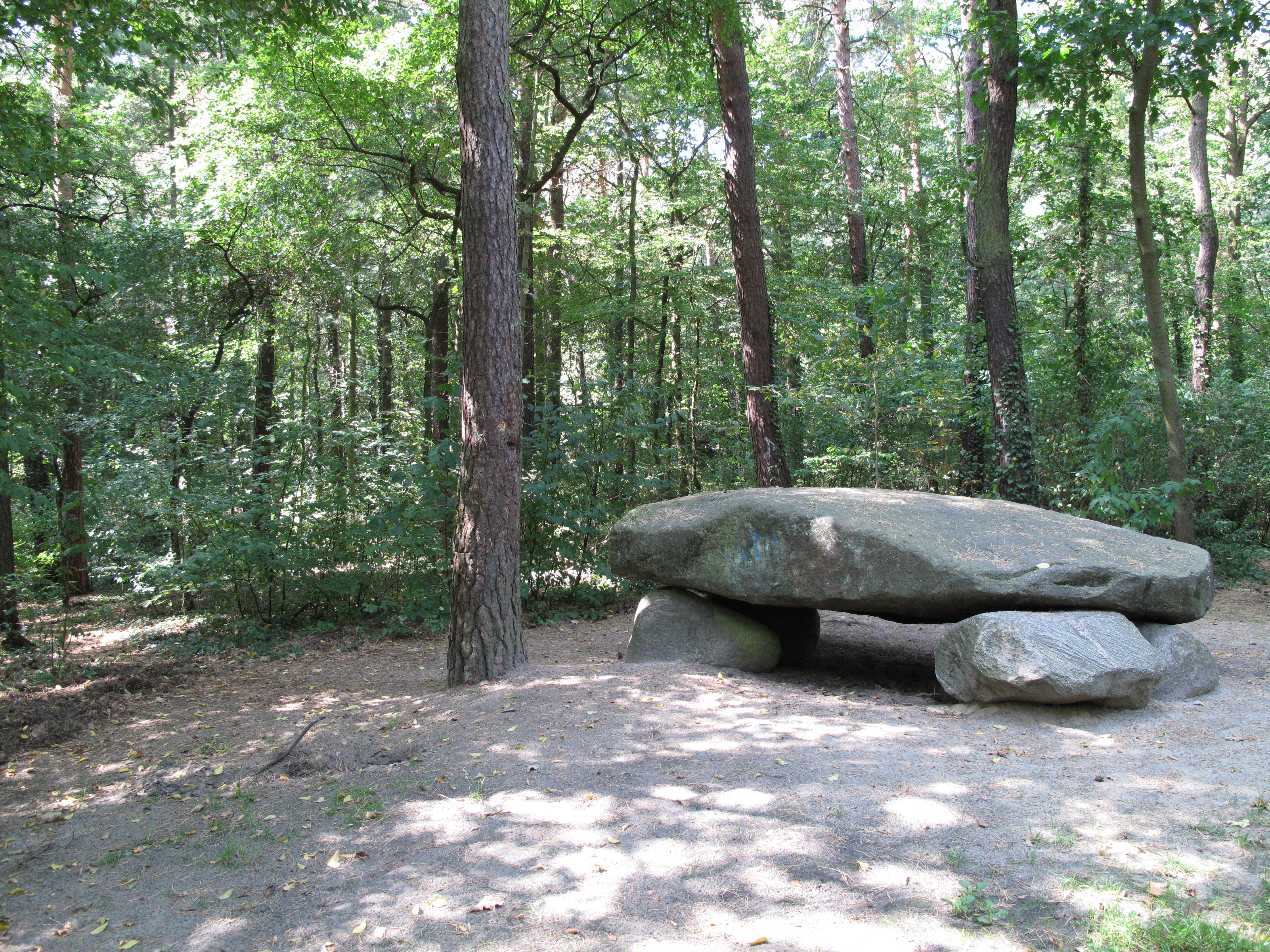 Parkanalge Steinbergpark Berlin. Dolmen-Monument.